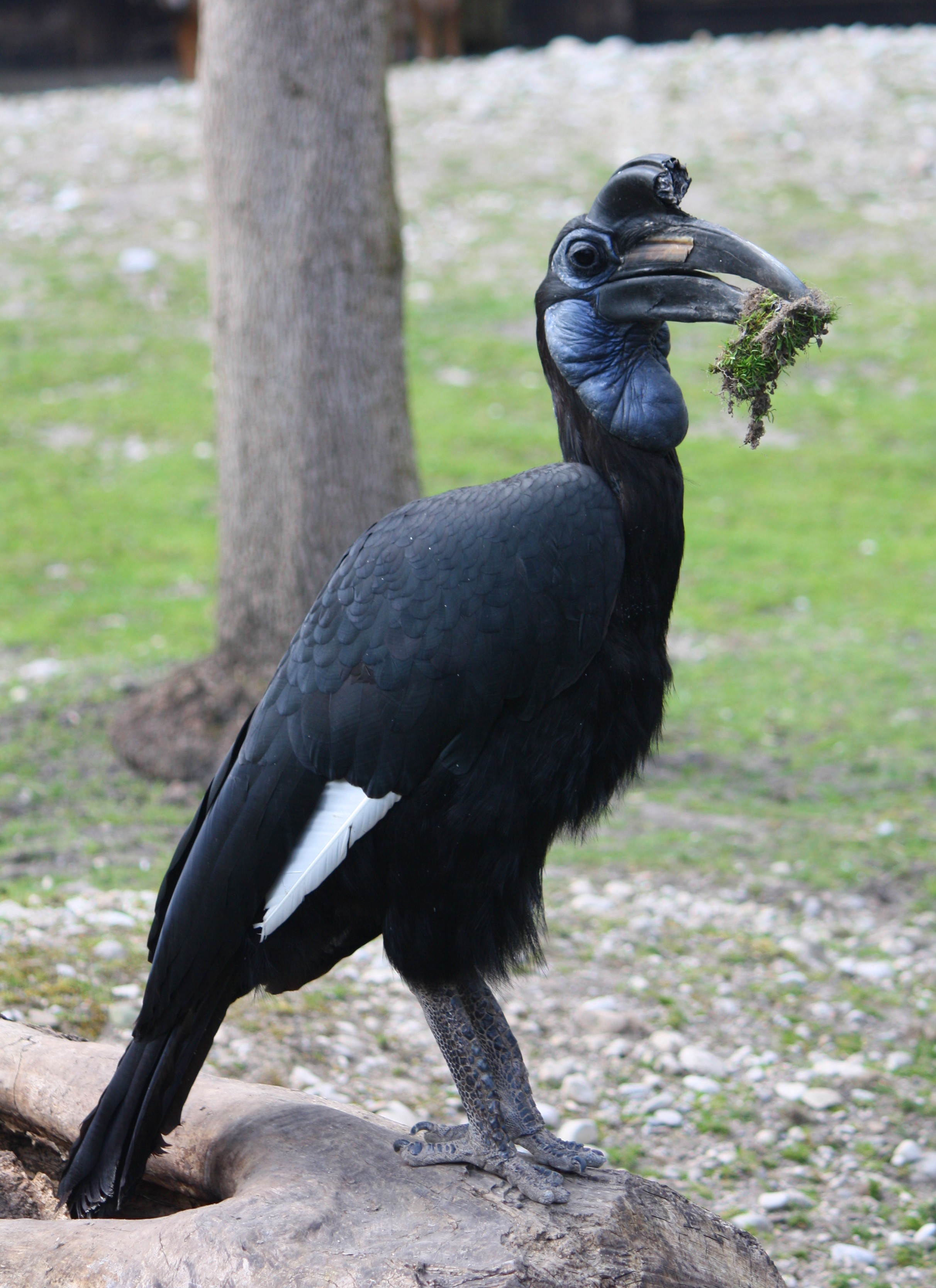 Nördlicher Hornrabe in Hellabrunn